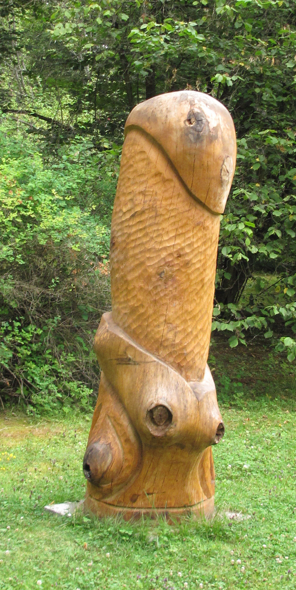 Jiří Černý: ?. ? dřevo. 2014. Lázeňský park v Konstantinových Lázních. Okres Tachov, Česká republika.